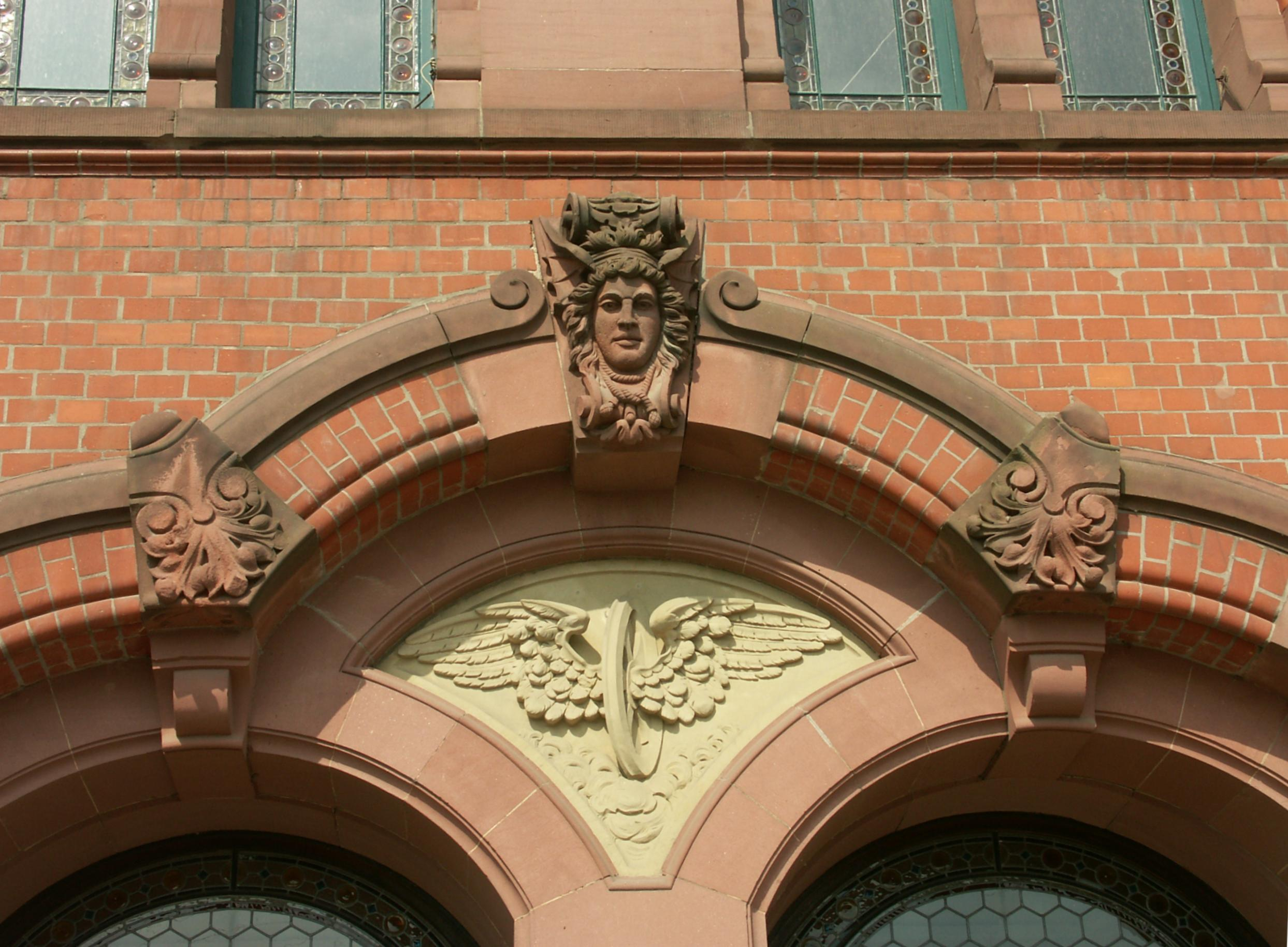 Eisenbahnflügelrad über der Eingangstür des Gebäudes der Reichsbanhdirektion Schwerin in der Paulsstadt